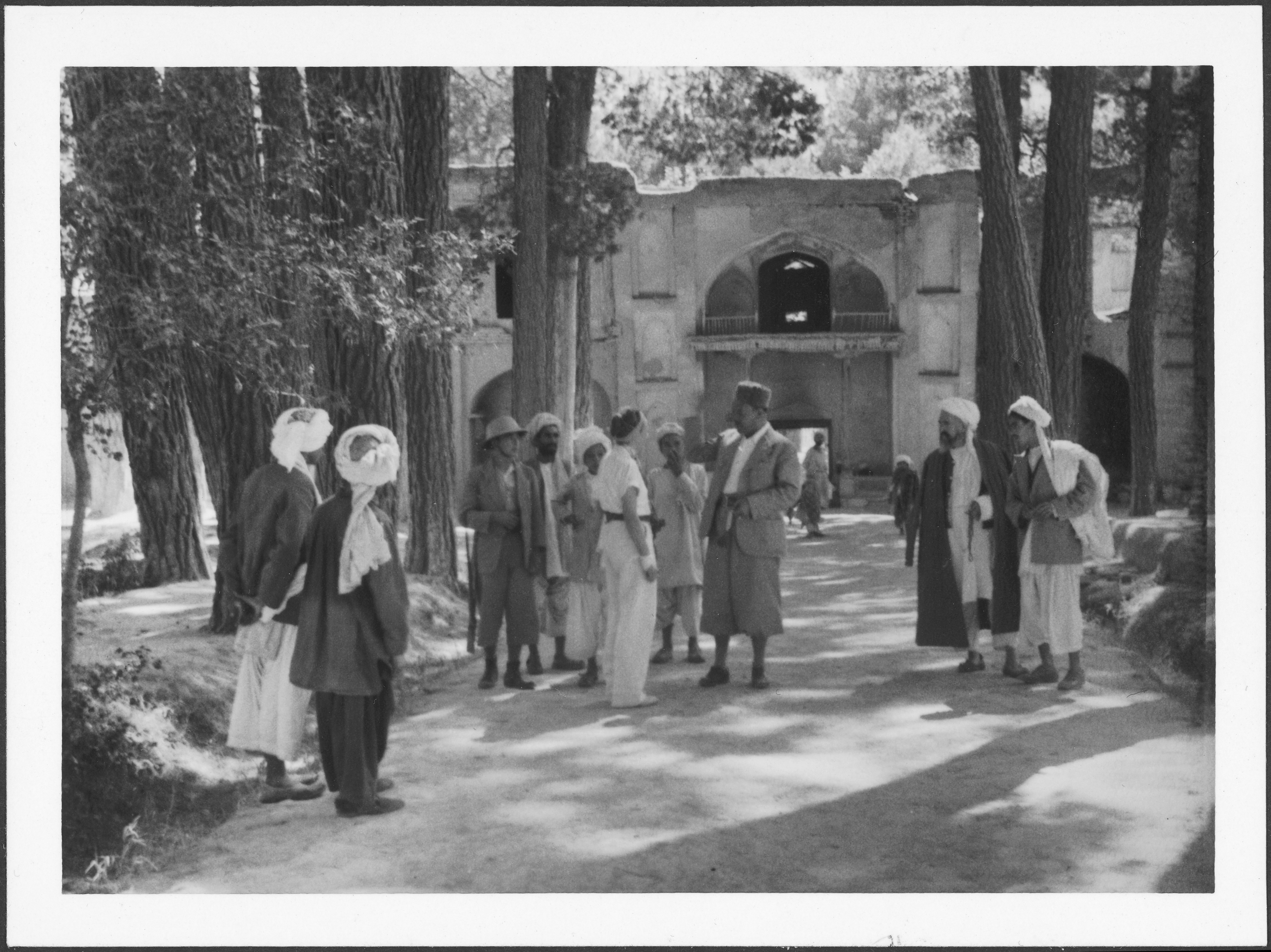 Afghanistan, Karokh: Schrein; Ella Maillart umgeben von einer Gruppe Männer, im Hintergrund Eingang zum Schrein